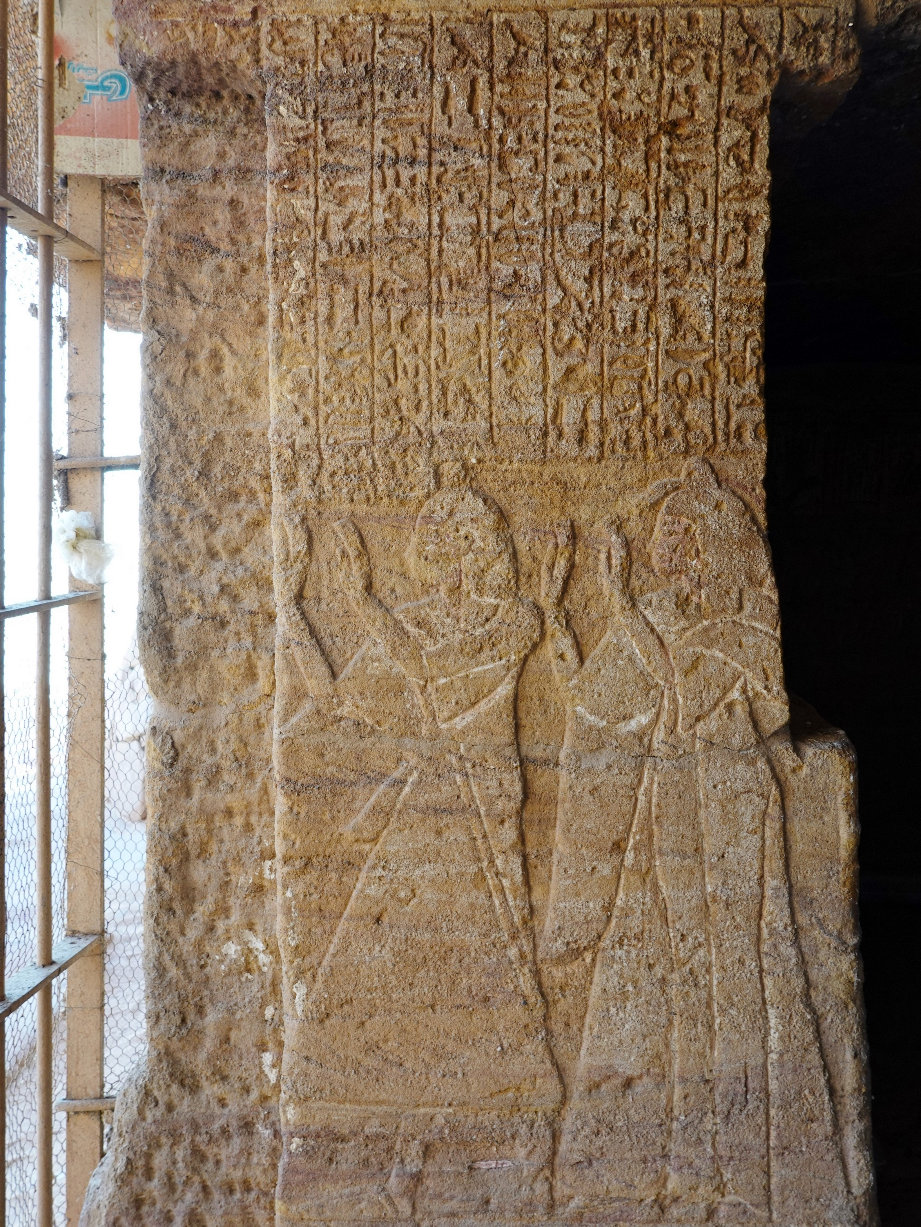 Grab des Pennut am Nassersee, Ägypten